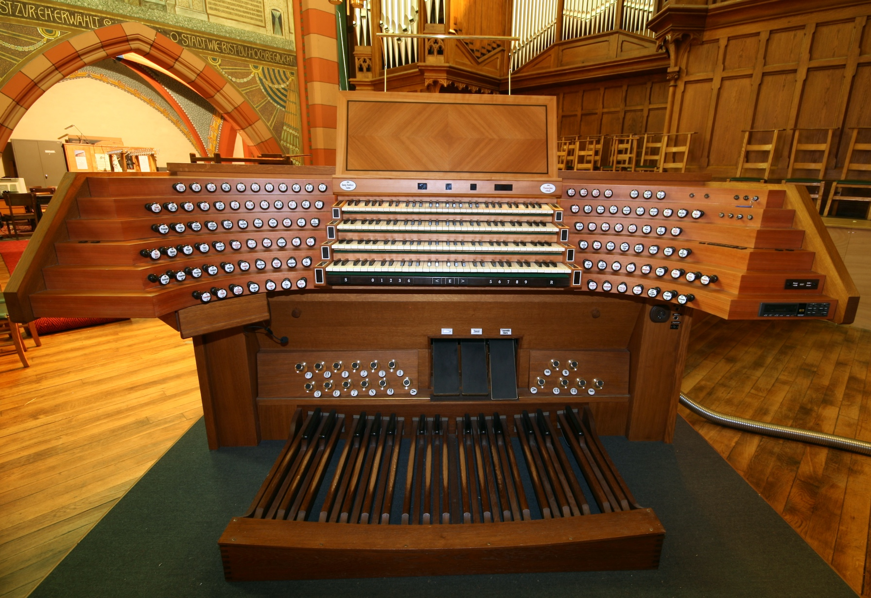 Sujet:Uergel Diddeleng Spilldësch Source:Eege Foto vum Benotzer:Cornischong